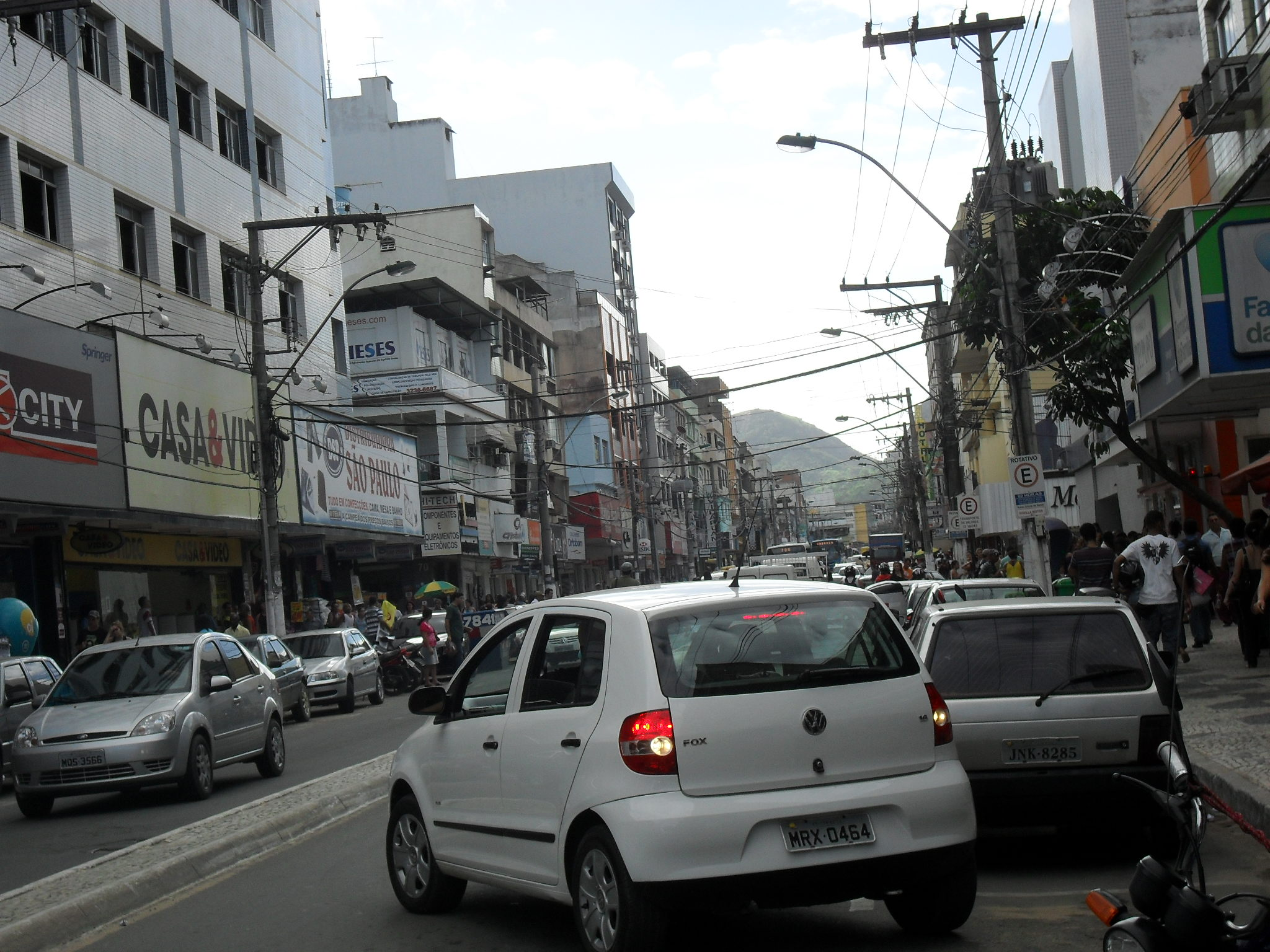 A- RUA DE CAMPO GRANDE-M CARIACICA